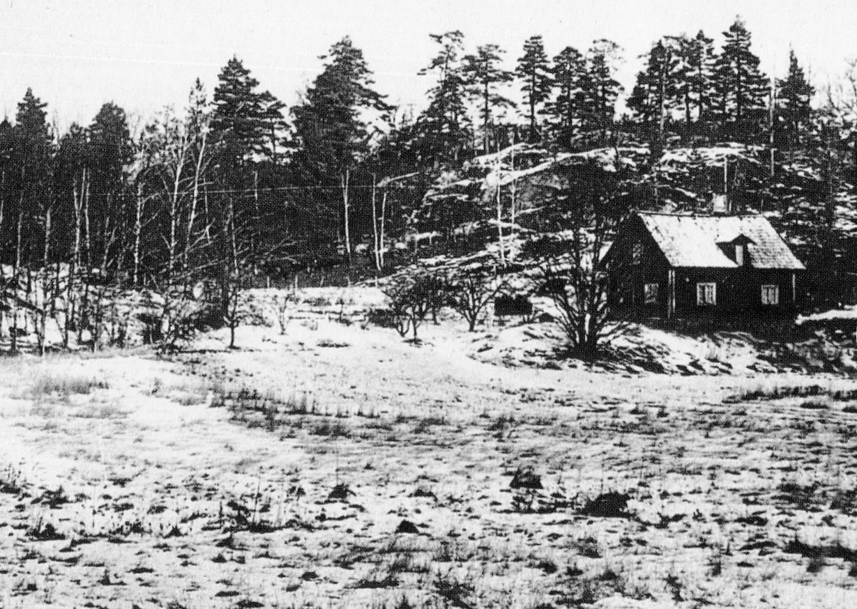 Högdalstorpet (revs ca 1960)